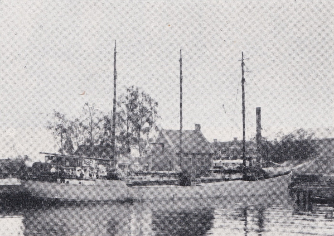 Motorseglaren Kinnekulle, besättningen försvunnen 1948